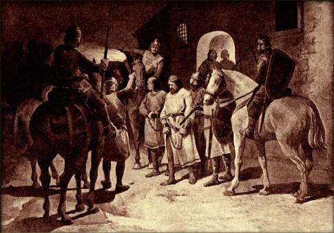 Věnceslav Černý - Bořivoj II. jako zločinec odváděn do Němec